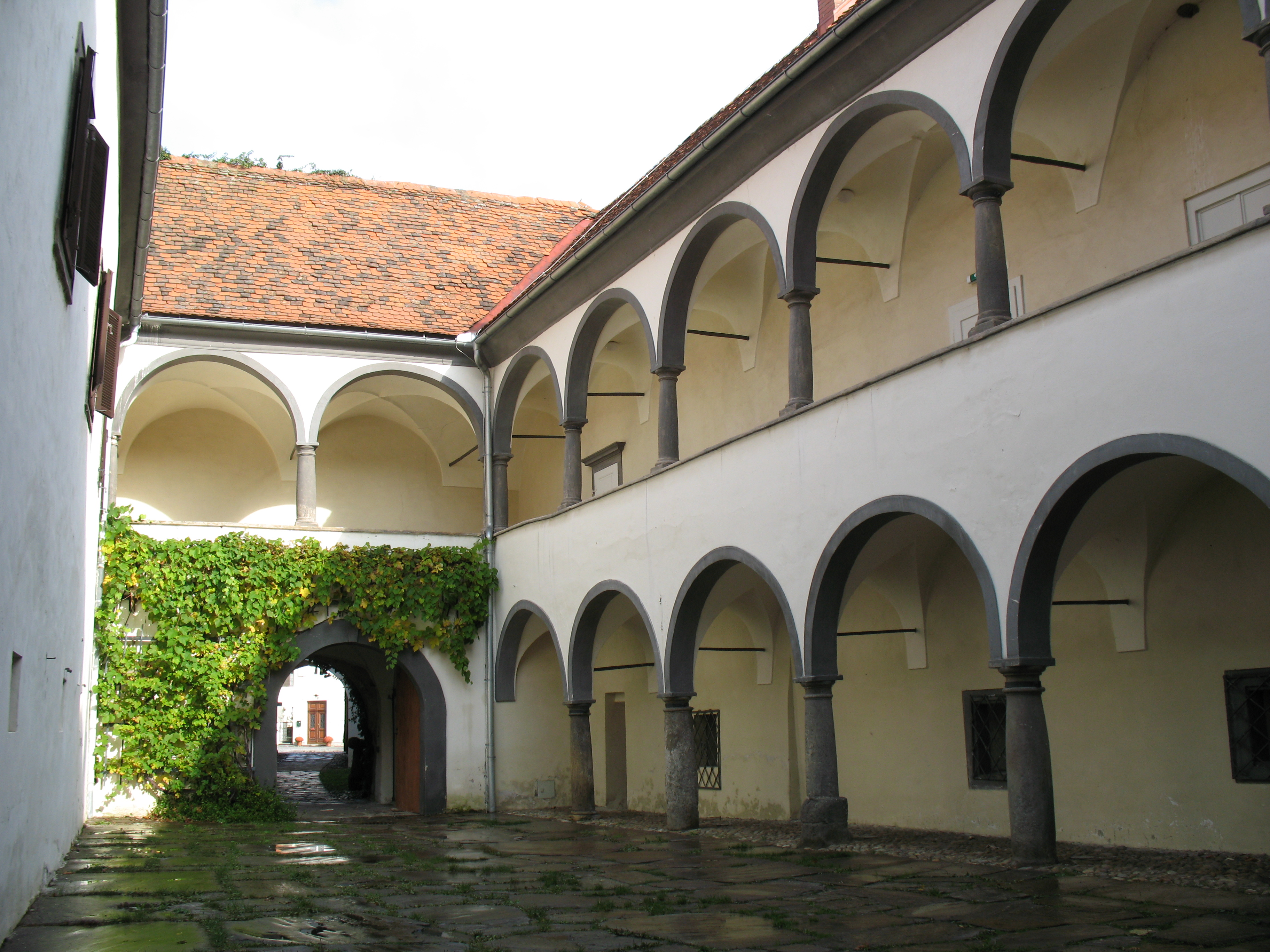 Ehemaliges Zeughaus, Stadtmuseum